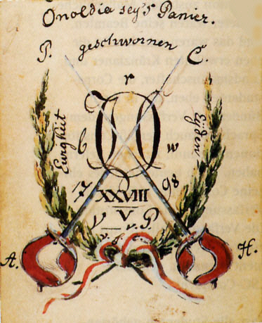 Bundeszeichen Corps Onoldia Erlangen, Stammbuchzeichnung um 1840, Rechte abgelaufen